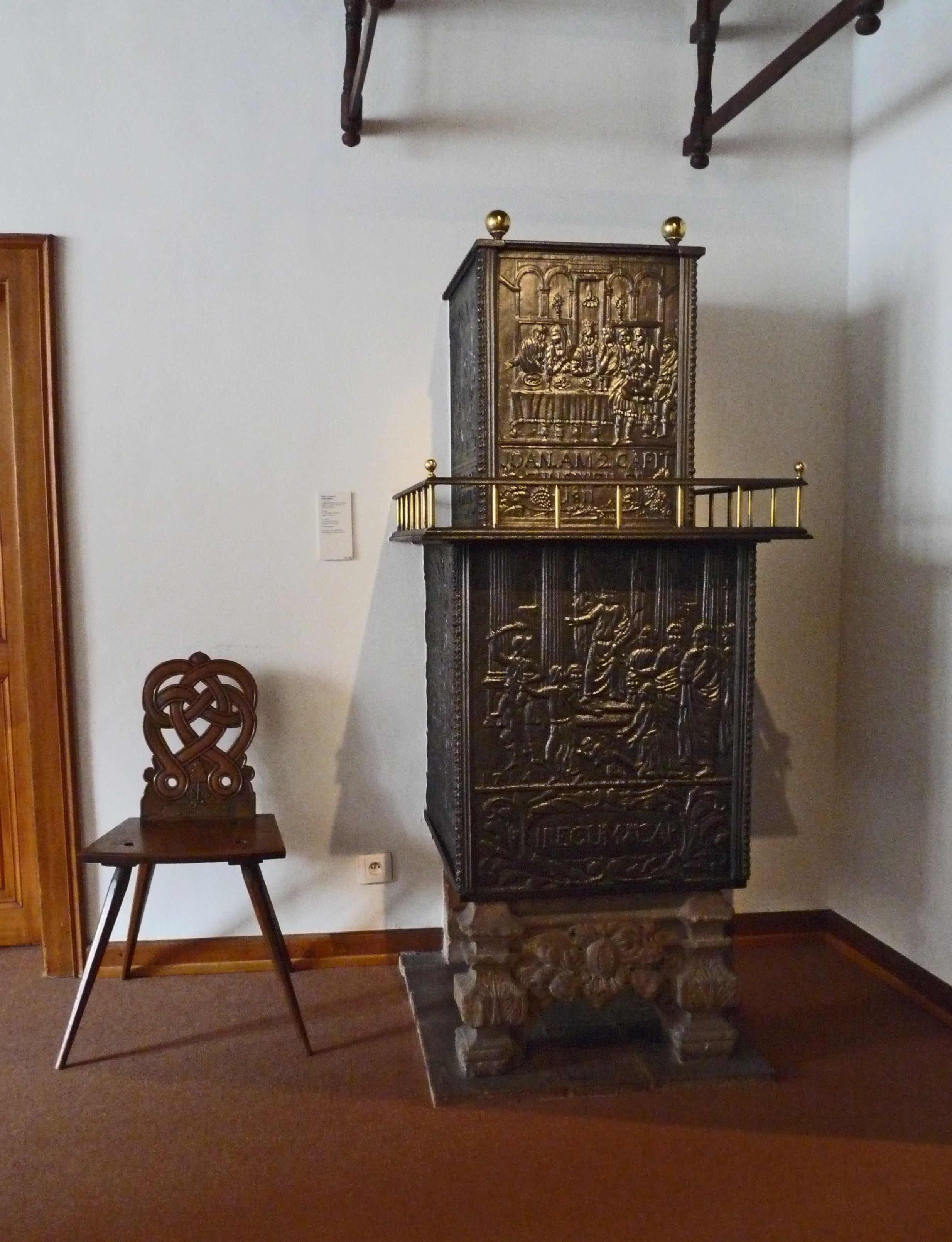 Poêle à plaques en fonte (Kaschteofe). Plaques produites à Zinswiller au début du 19e siècle, assemblées par la suite. Les Noces de Cana sur la plaque supérieure, le Jugement de Salomon sur celle du bas. Musée alsacien de Strasbourg.